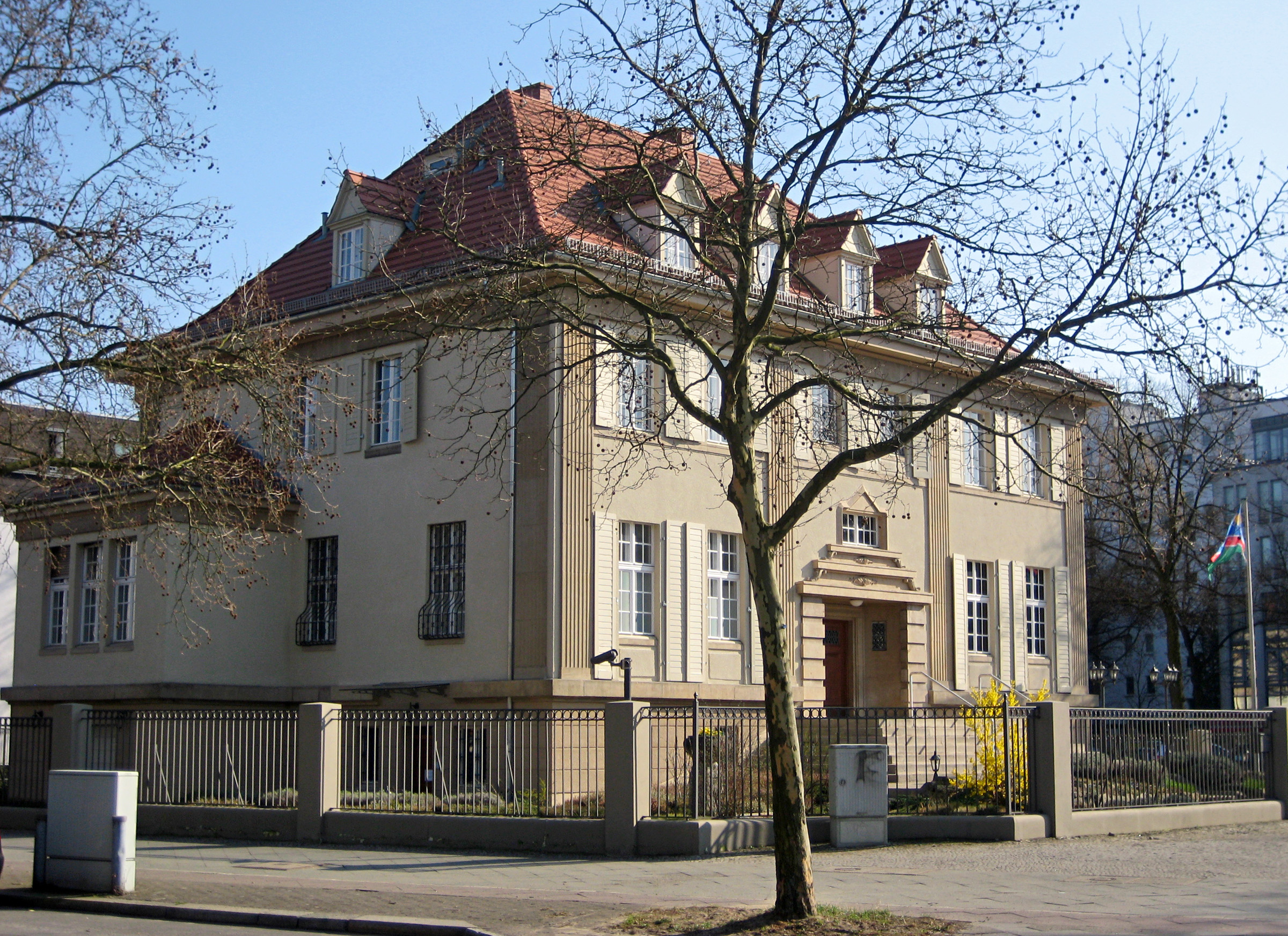 Namibian Embassy, Berlin; Reichsstraße 17 (Goldstein-Villa)